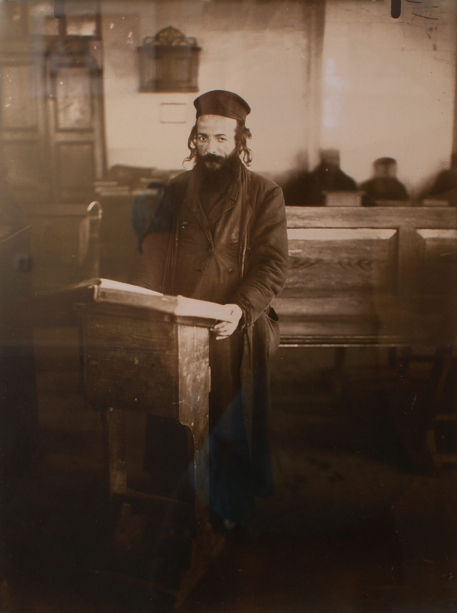 Талмудзіст. Фота С. Юдовіна 1912-14 гг. Копія. Арыгінал ў Расійскім этнаграфічным музеі Санкт-Пецярбург